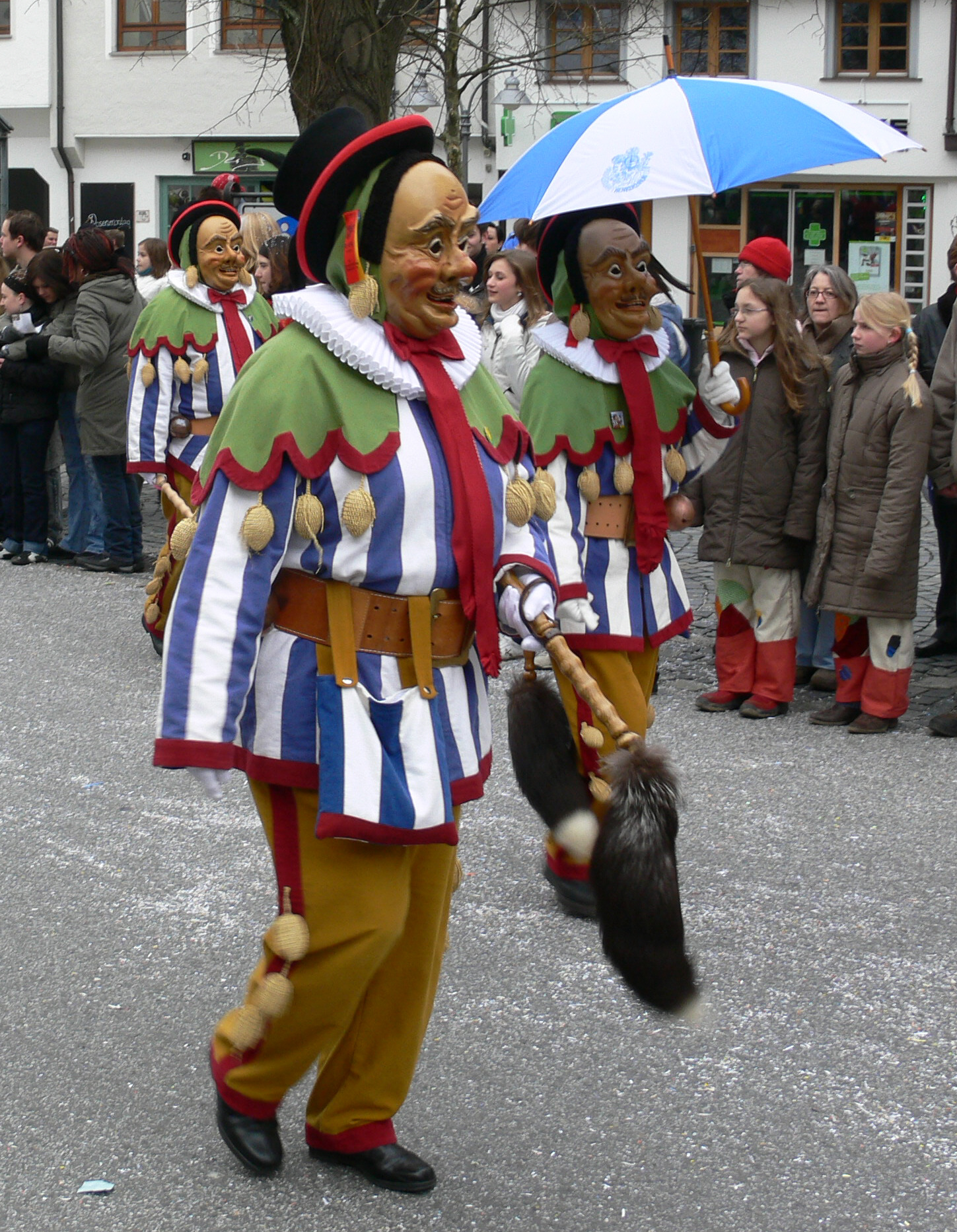 Narrensprung am Fasnetsmontag, 4. Februar 2008 in Ravensburg: Kardelhannes der Narrenzunft Henkerhaus Baienfurt